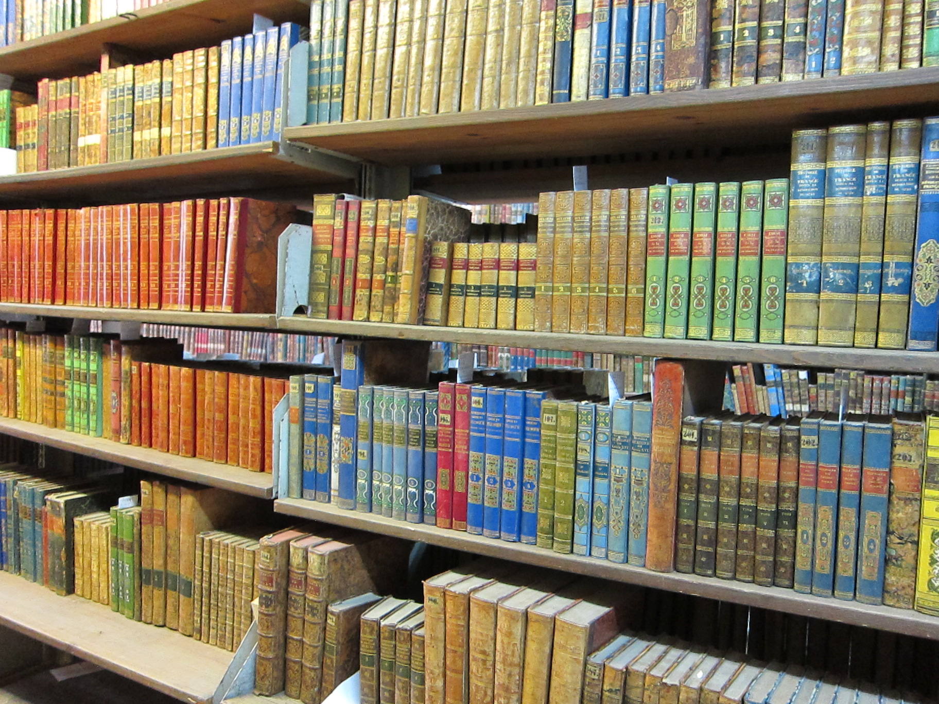 Библиотека А.П. Ермолова в Отделе редких книг и рукописей Научной библиотеки МГУ имени М.В. Ломоносова.